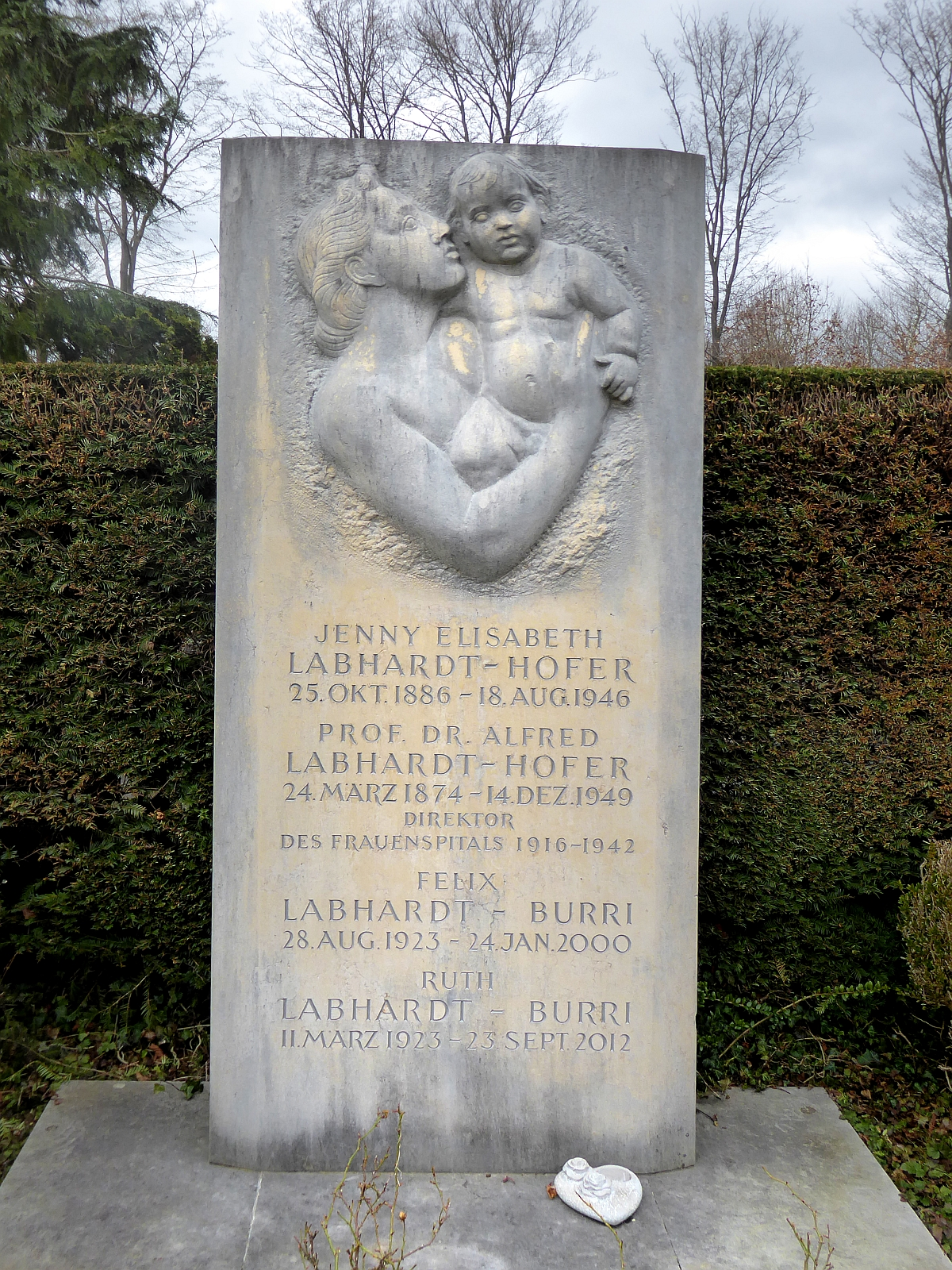 Alfred Labhardt-Hofer (1874–1949) Gynäkologe, Direktor des Frauenspitals Basel (1916–1942), Familiengrab auf dem Friedhof Hörnli, Riehen, Basel-Stadt